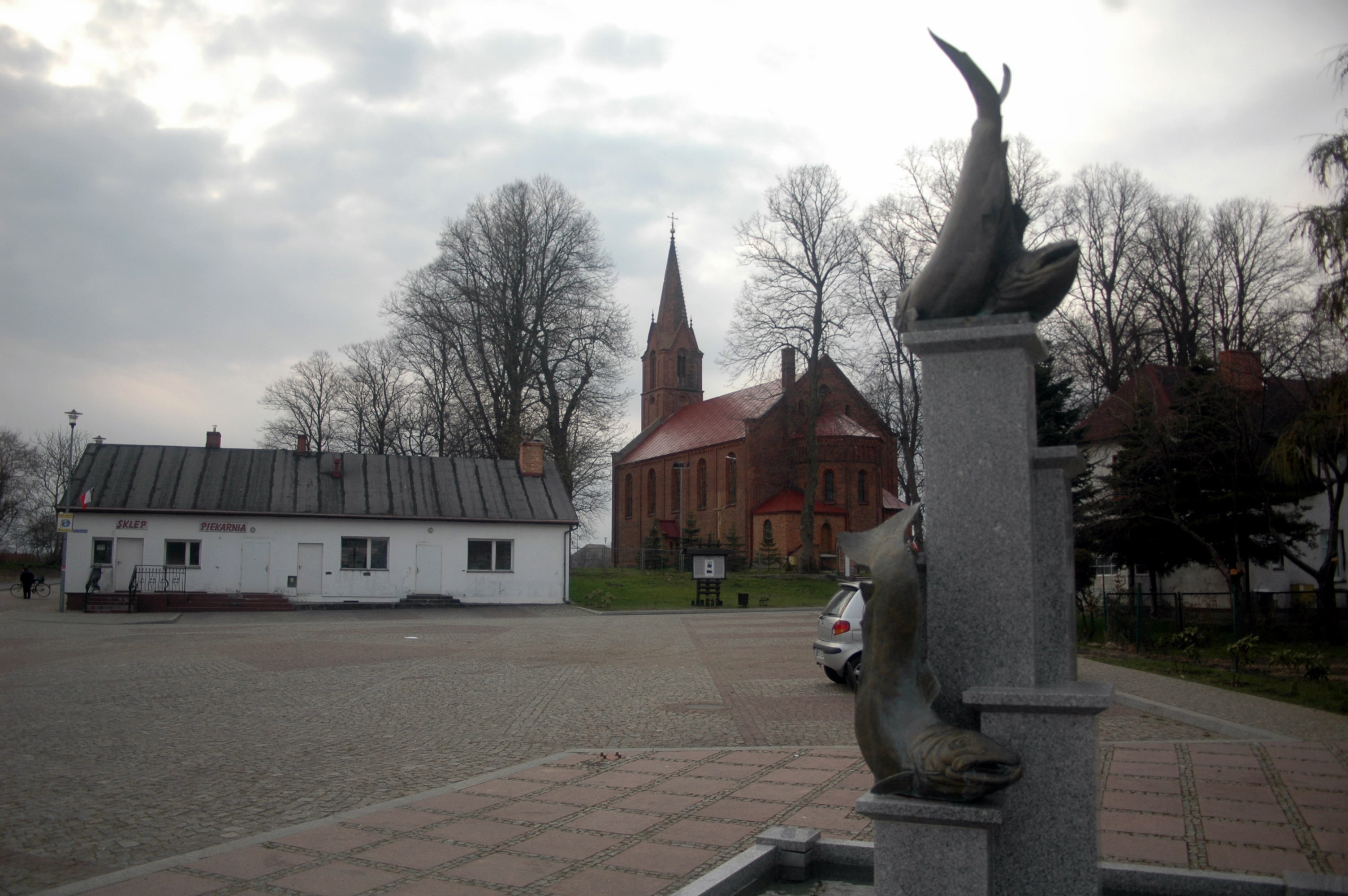 Plac Wolności w Dygowie.